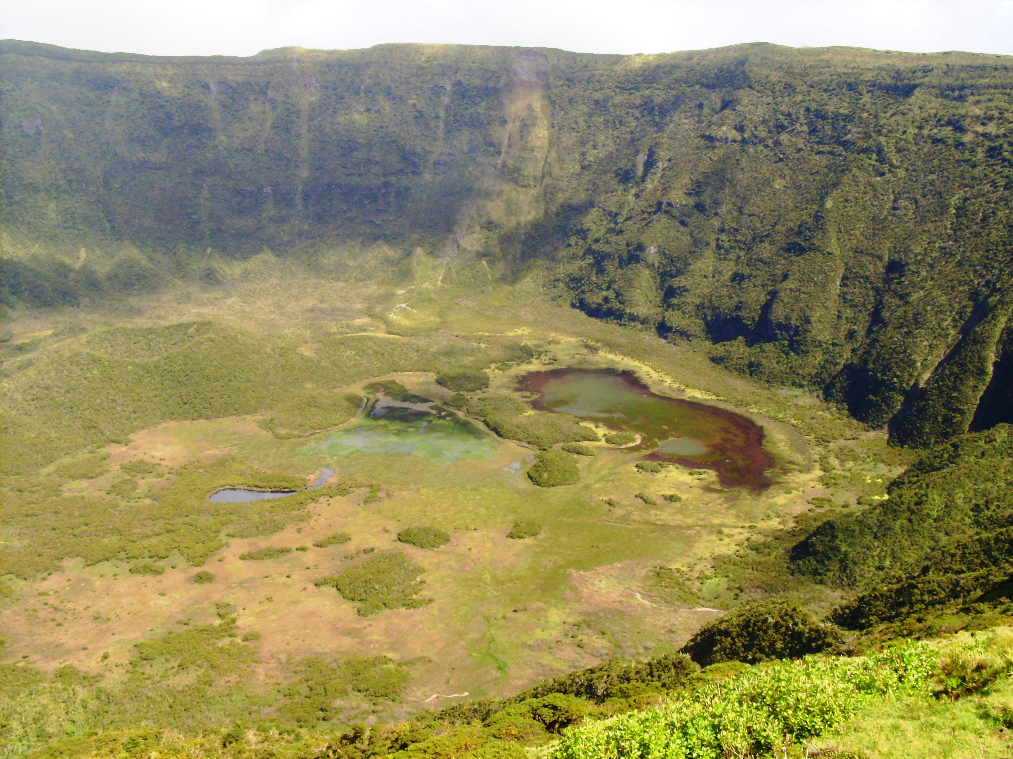 Caldeira, maciço da Caldeira, ilha do Faial, Açores.